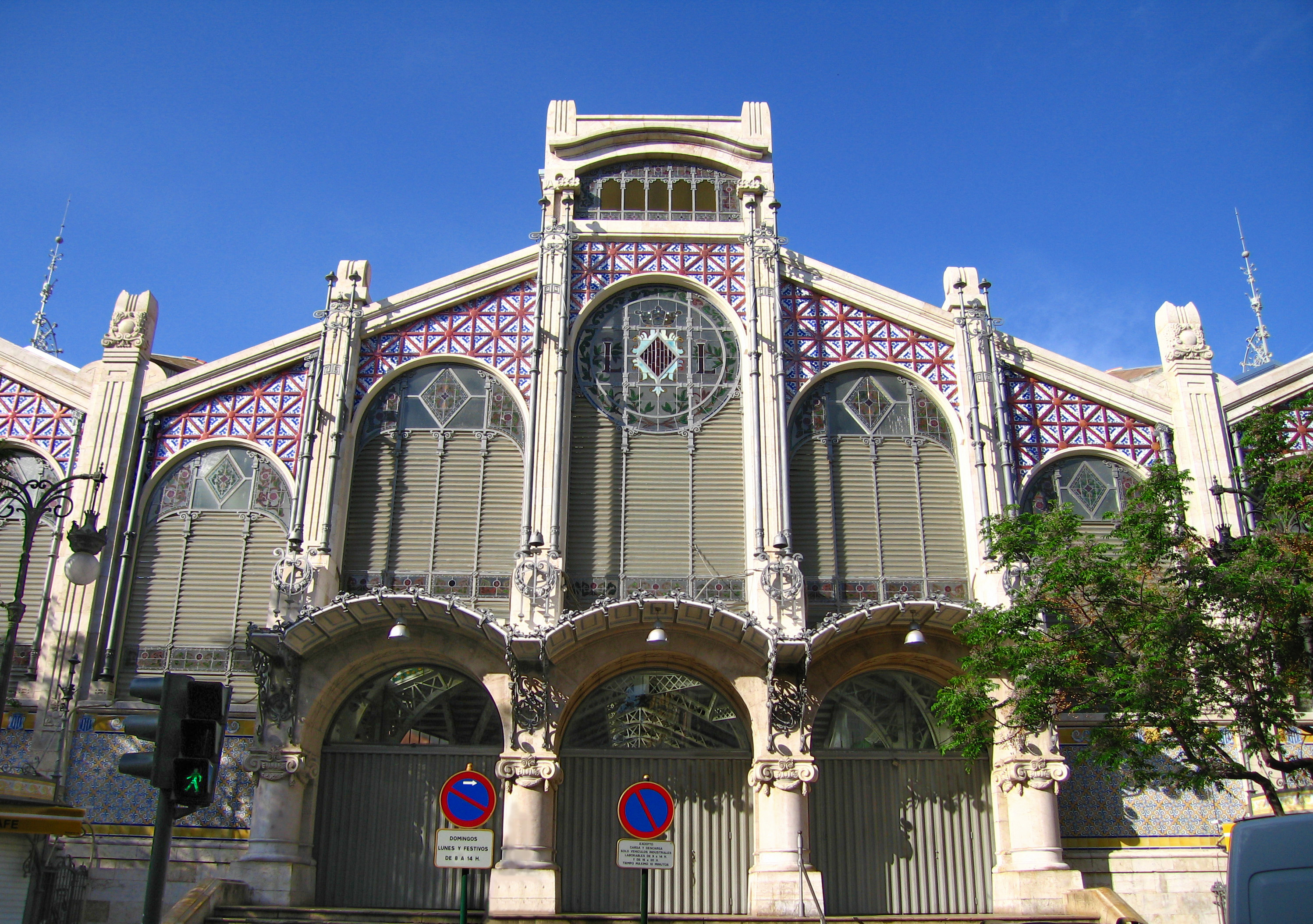 Façana de Davant del Mercat Central de València